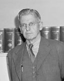 Nils Herlitz vid möte med Kejnekommissionen.